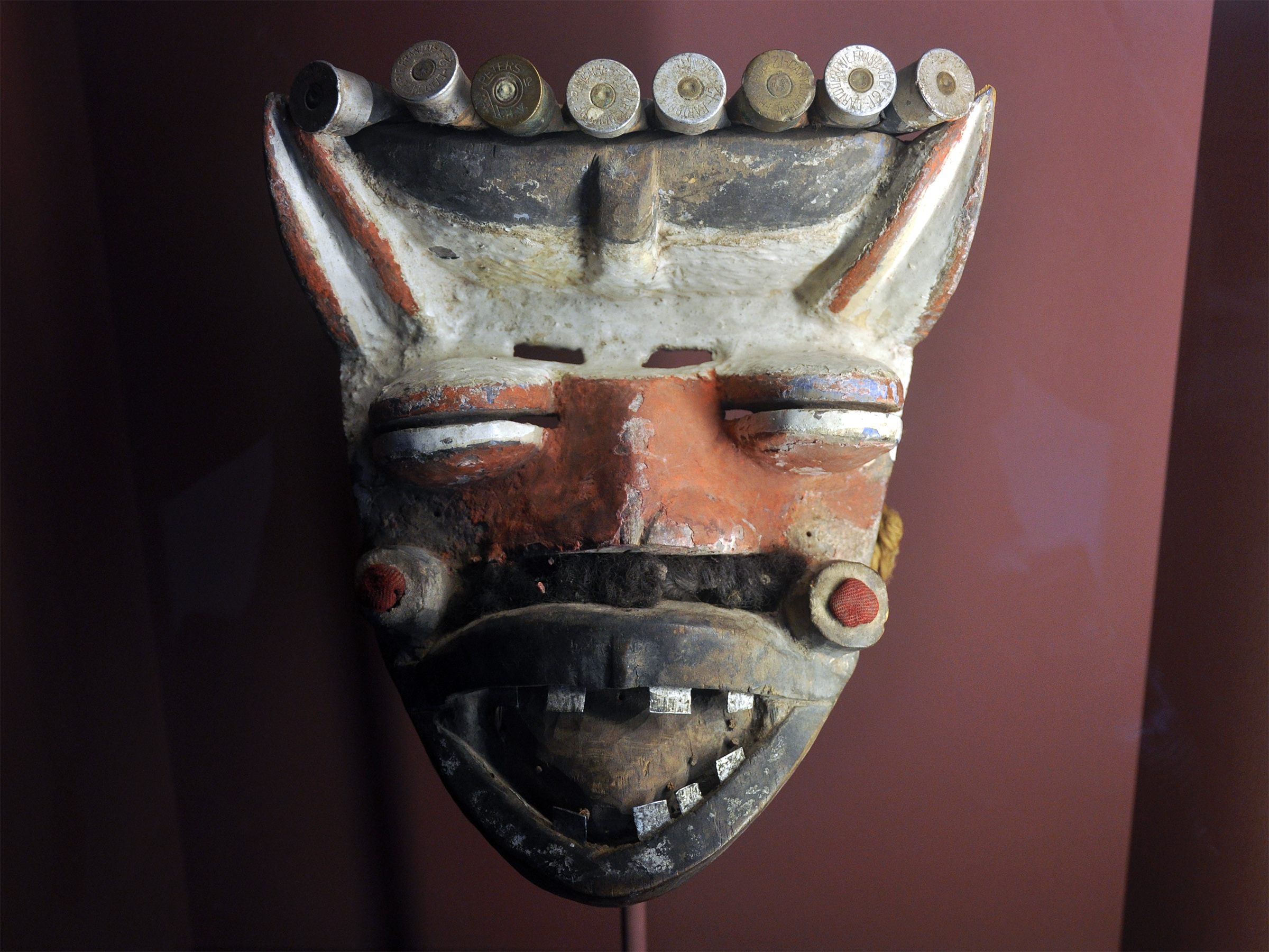 Masque Dan, orné d'une rangée de cartouches et utilisé pour des danses guerrières. Côte d'Ivoire. Musée africain de Lyon.